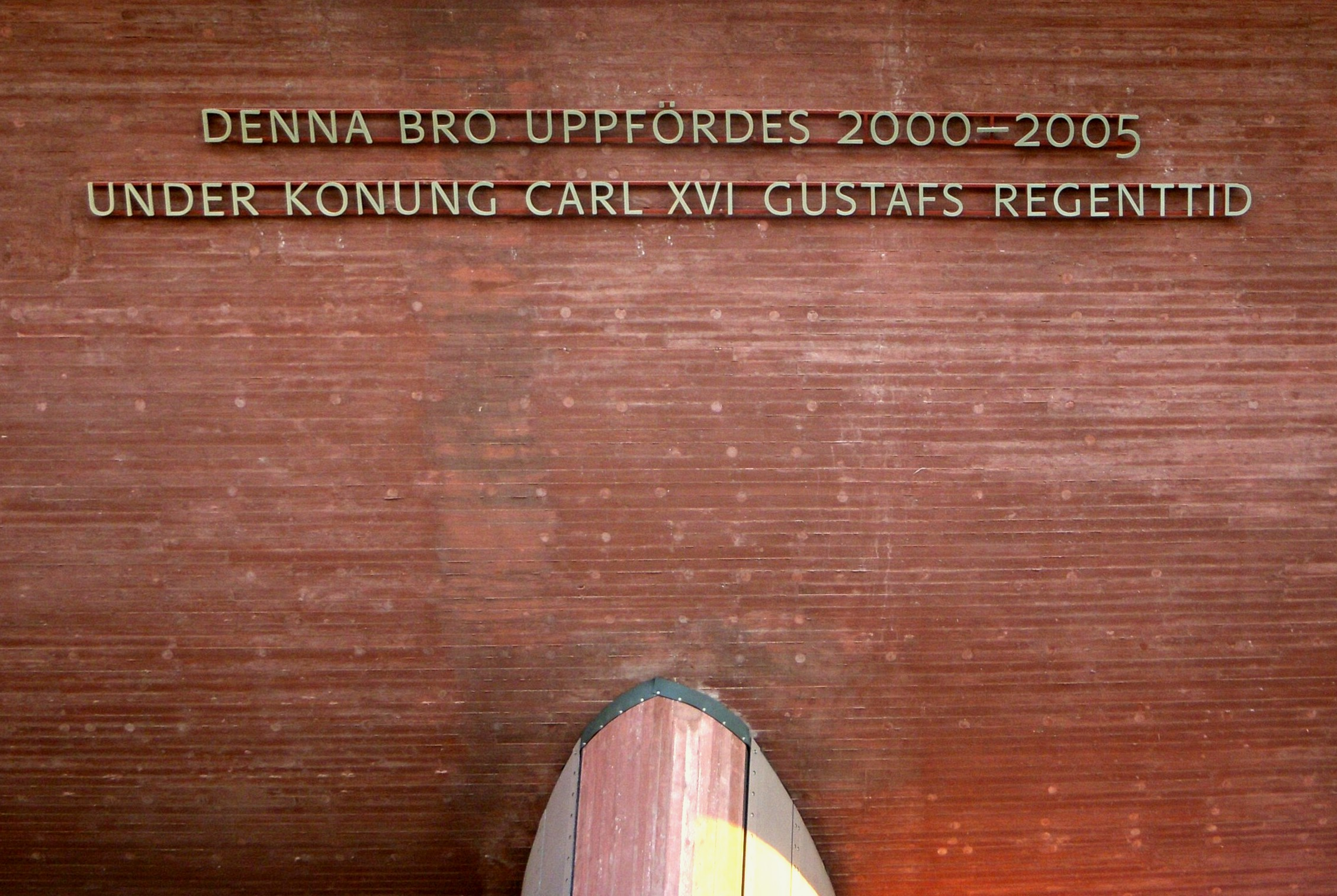 Nya (västra) Årstabron i Stockholm, inskription